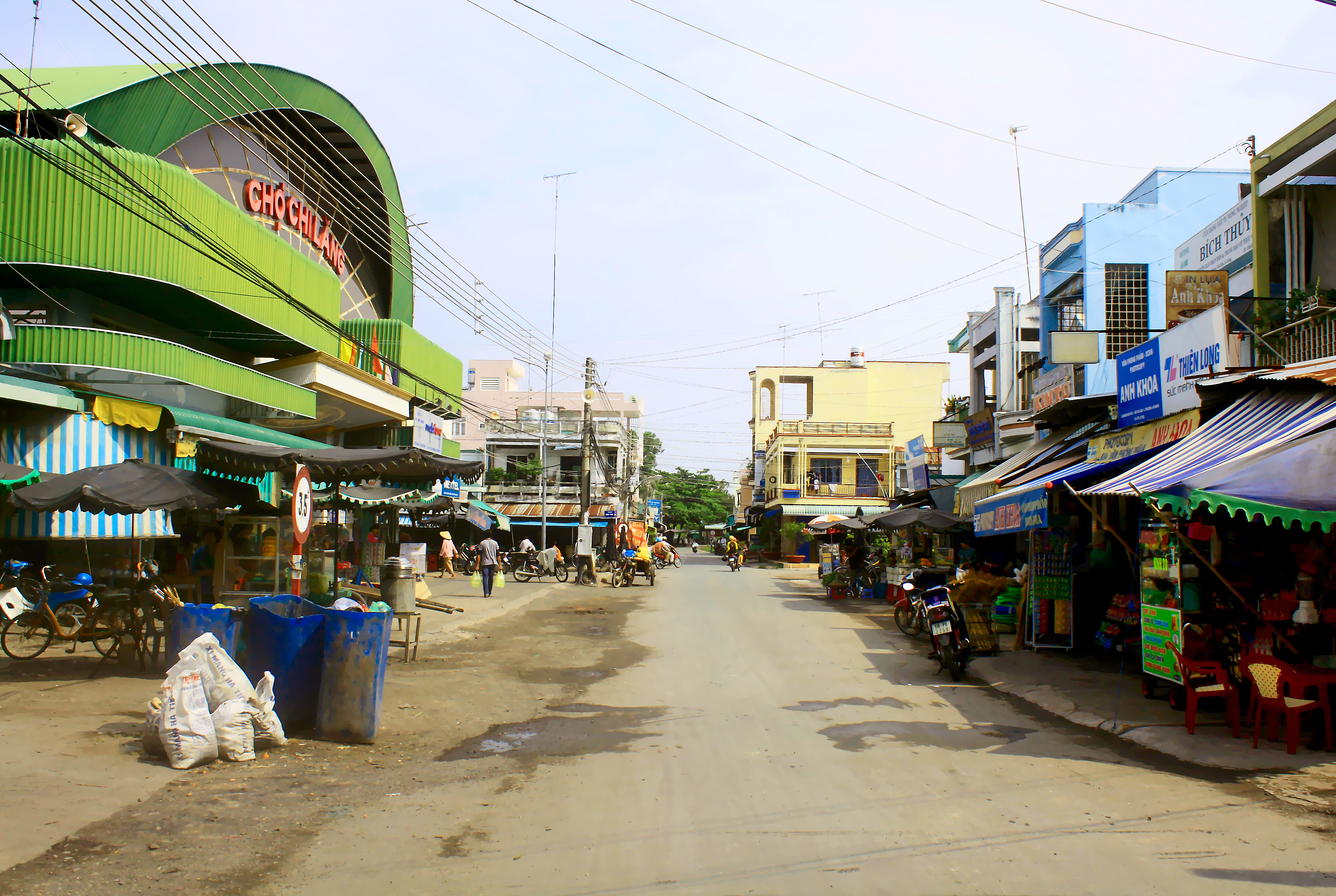 Chợ Chi Lăng (khu 2) ở thị trấn Chi Lăng, huyện Tịnh Biên, An Giang, Việt Nam.